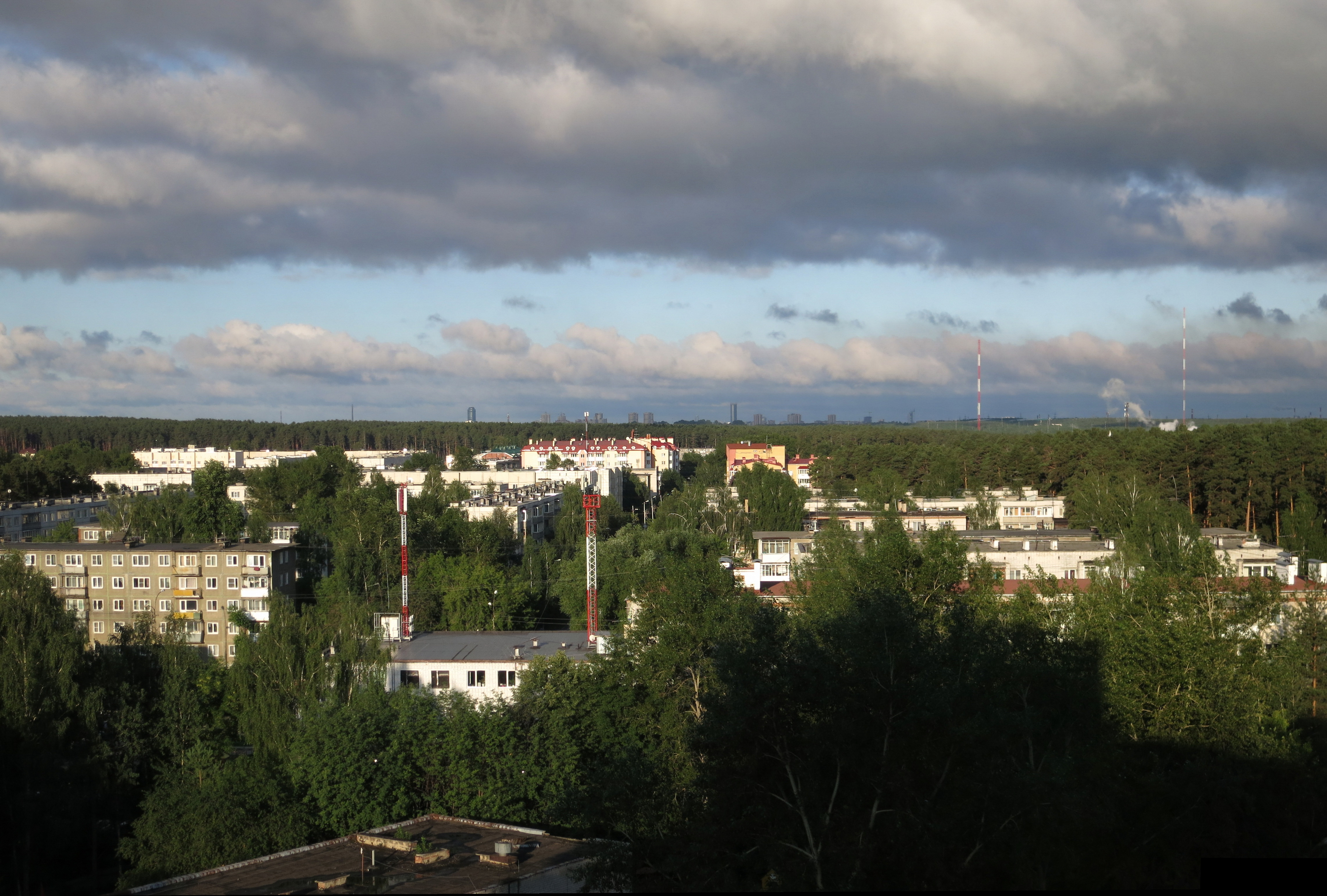 Вид из Новоберёзовского посёлка в сторону Екатеринбурга